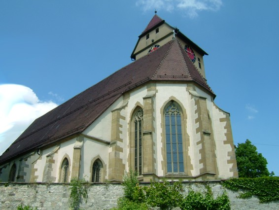 Blick vom Marktplatz Magstadt zur Ev. Kirche